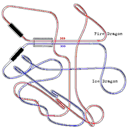 Dueling Dragons layout